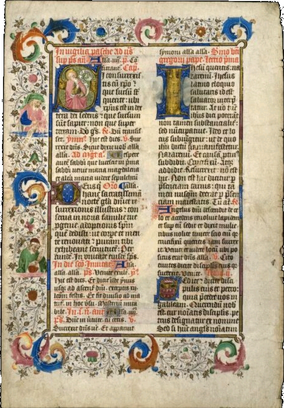 Meester van Zweder van Culemborg met helft van verlucht blad in het Egmond Brevier